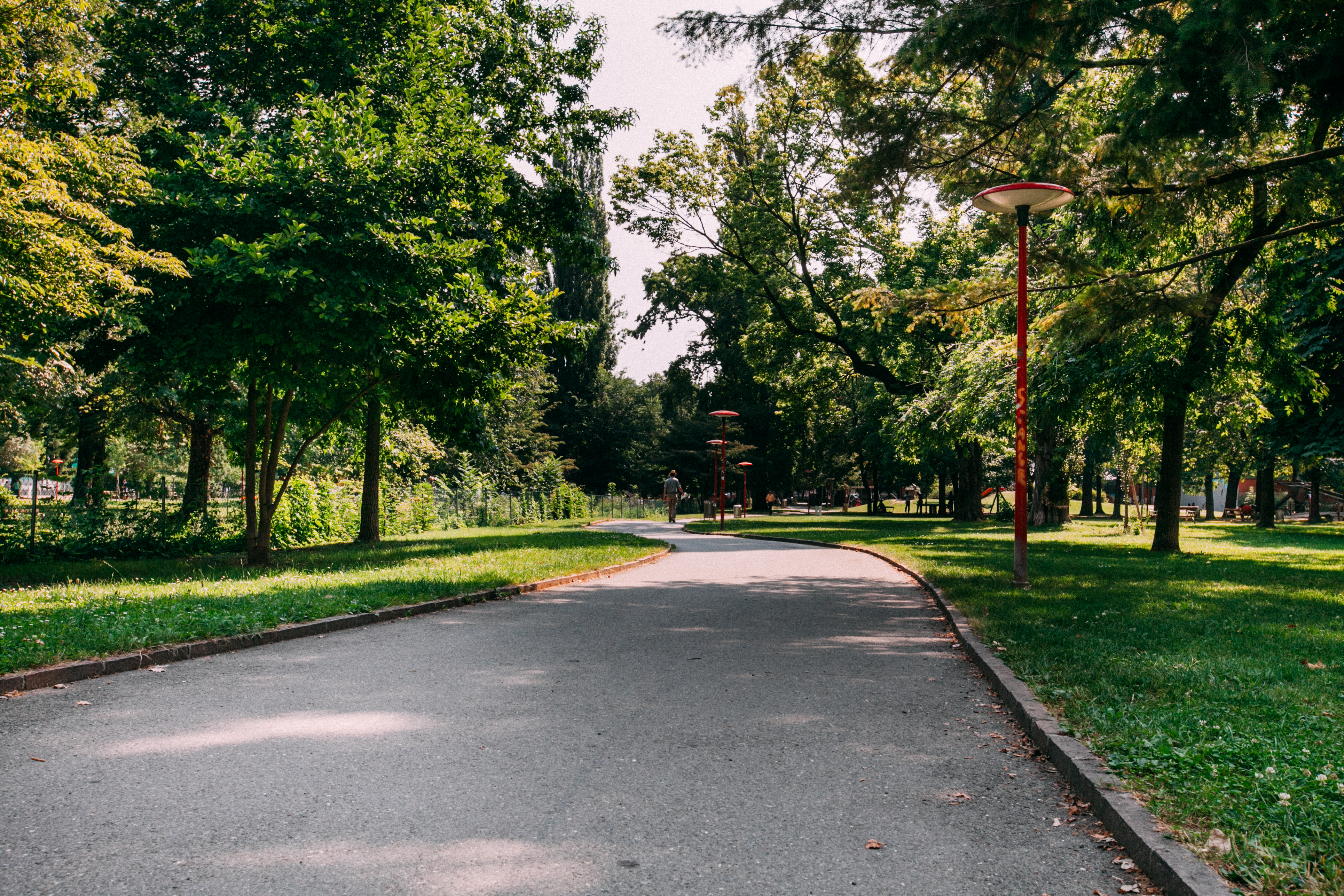 Weitere Parkansicht